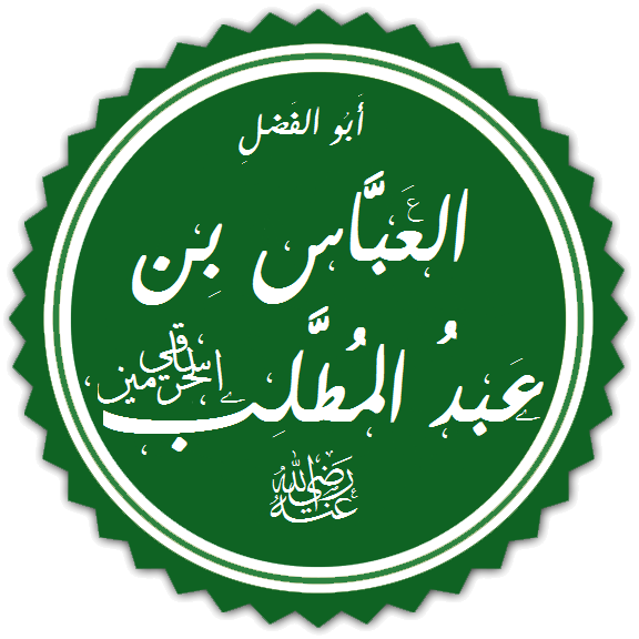 تخطيط لاسم العبَّاس بن عبد المُطلب ملحوق بدُعاء الرضا عنه.